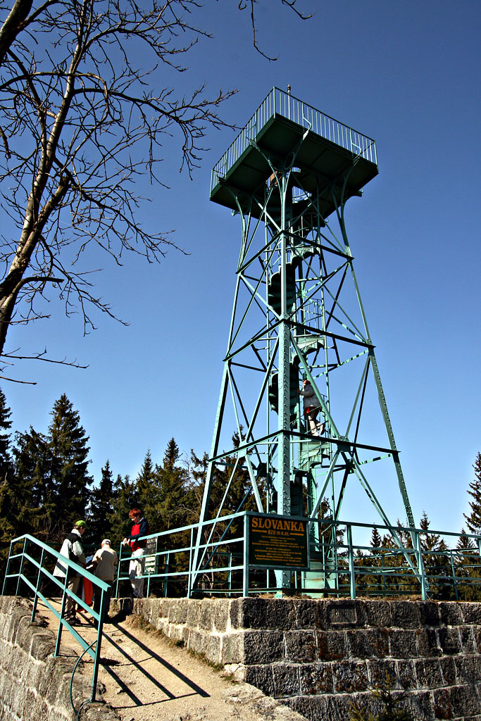 Rozhledna Slovanka, pohled od chaty